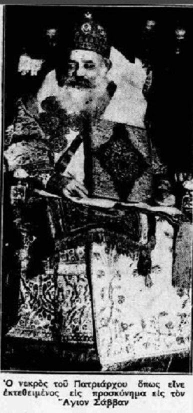 Το νεκρό σώμα του Πατριάρχη Αλεξανδρείας Μελέτιου Μεταξάκη, σε καθιστή θέση όπως θα ταφεί